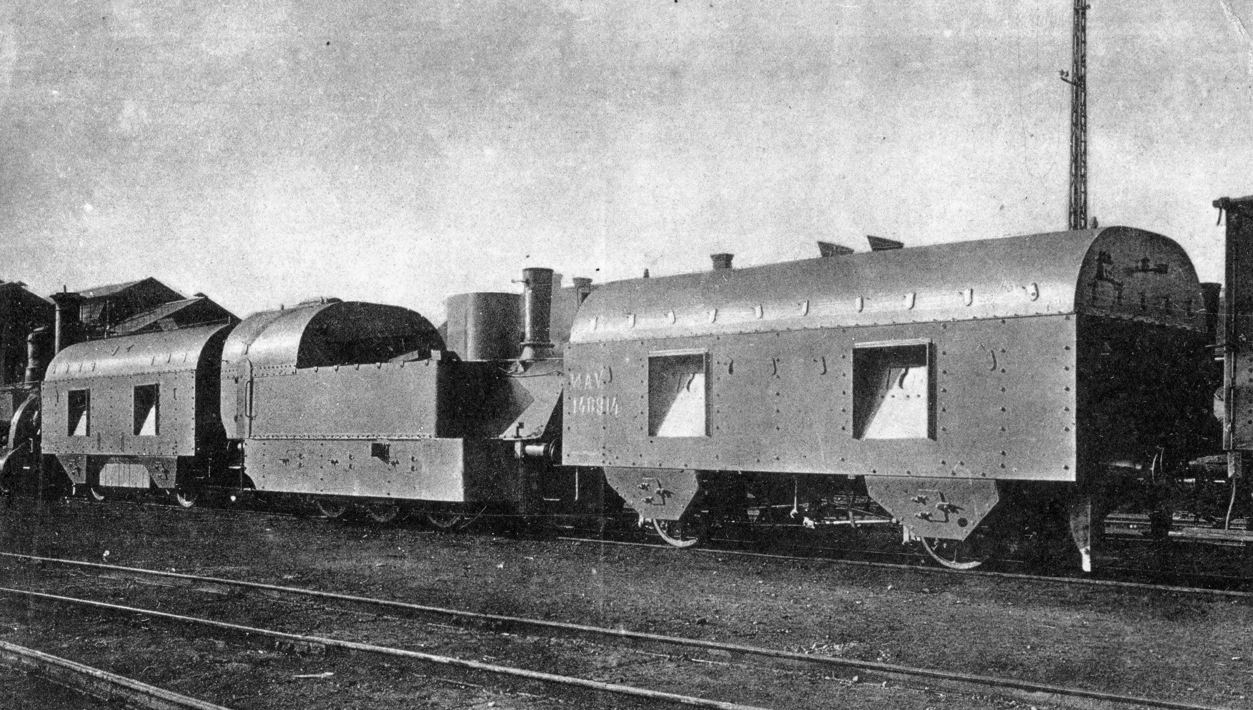 A k.u.k. hadsereg II. számú páncélvonata. Tags: Hungarian Railways, steam locomotive, armored railway, railway Title: A k.u.k. hadsereg II. számú páncélvonata.